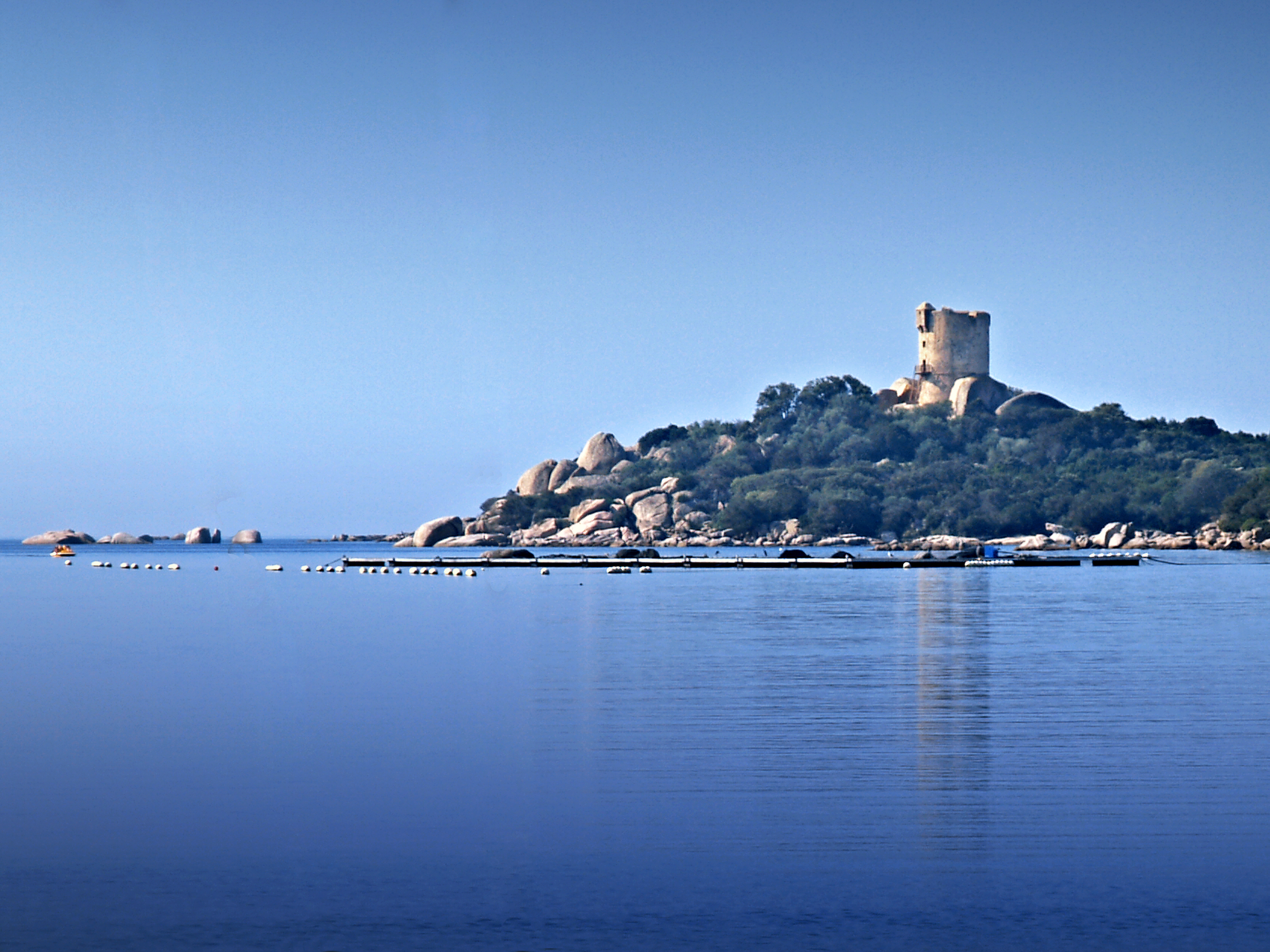 Pianotolli-Caldarello (Corse) - Tour génoise de Figari (ou de Caldarello), du XVIe siècle. MH